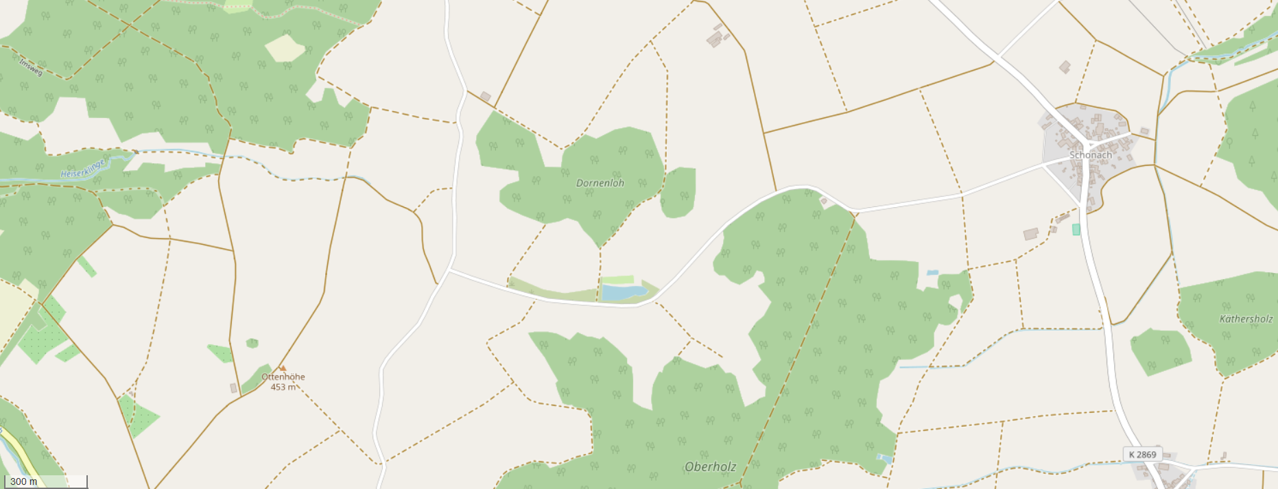 Badesee Schonach - auch Karrodsee, Karoth-See oder Weiher Karrod